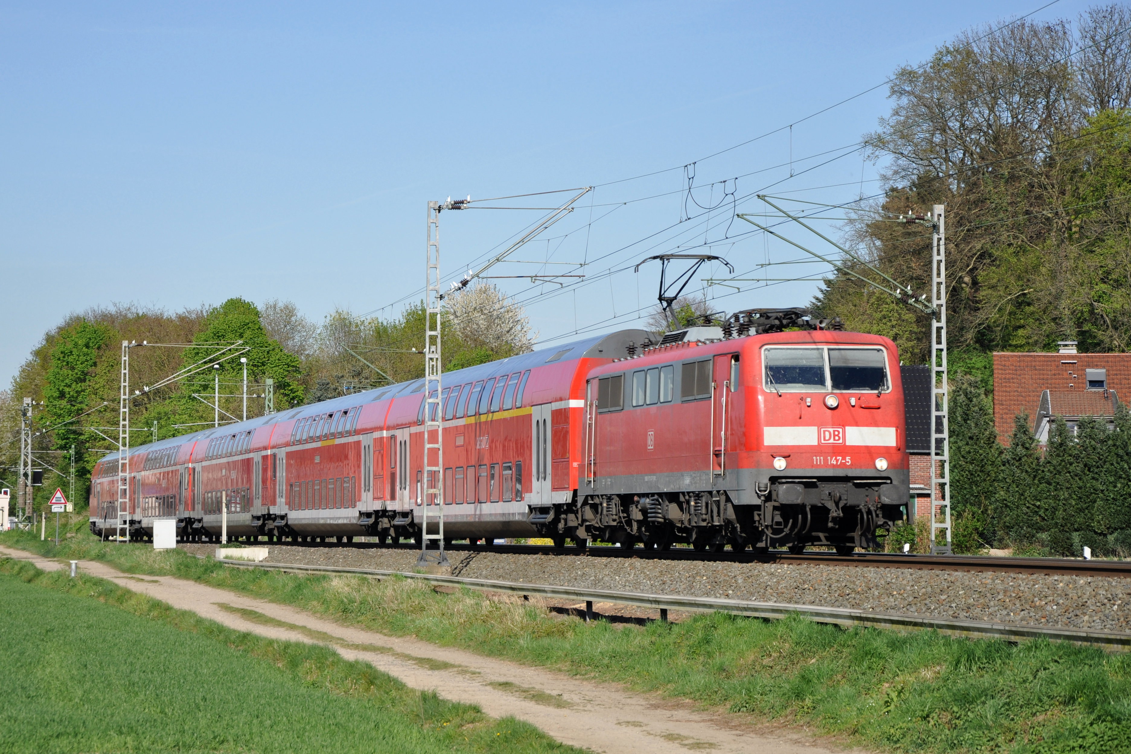 111 147 / DB Regio NRW // Geilenkirchen / 16. April 2014